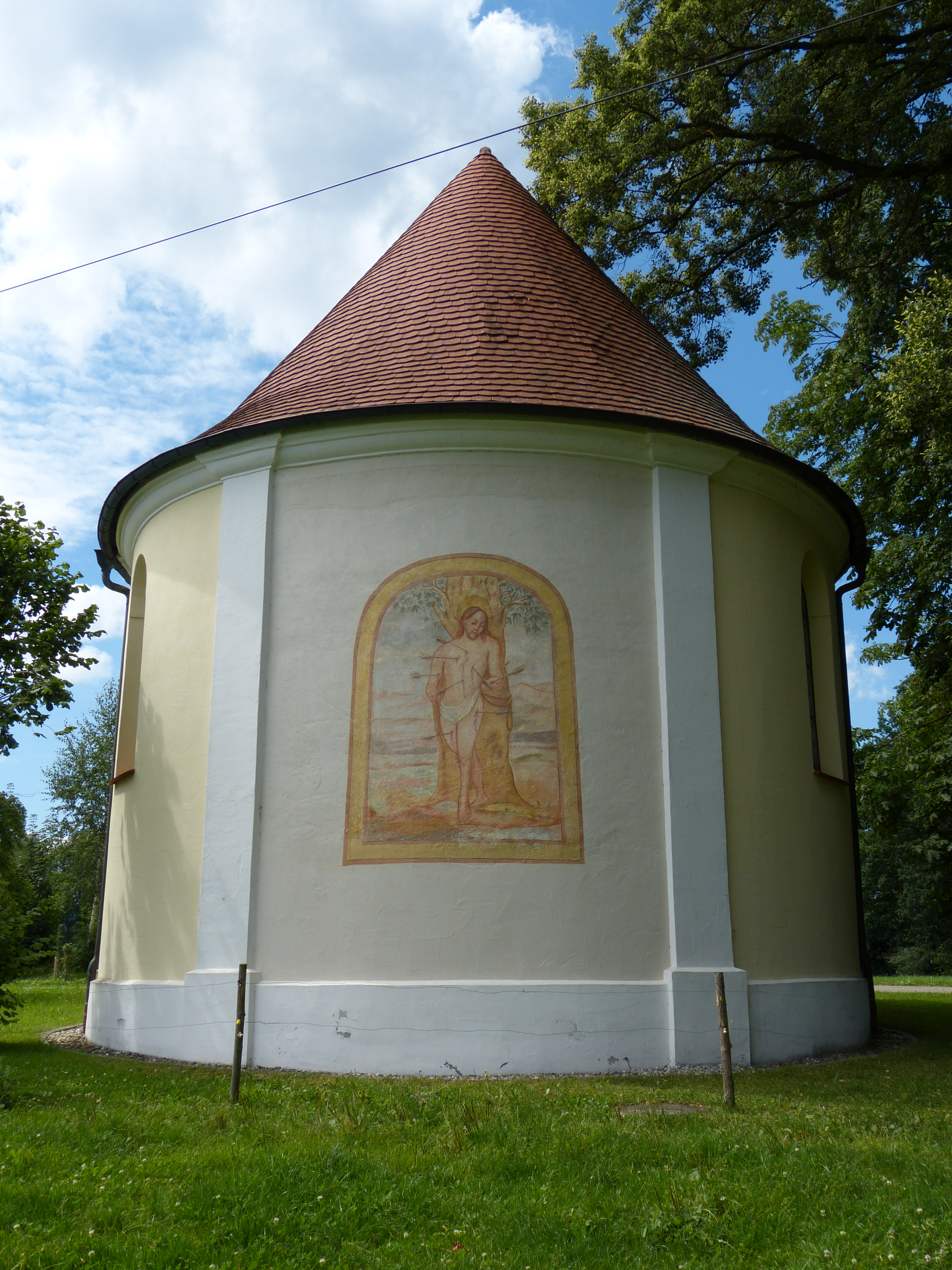 Kapelle St. Sebastian, Sankt Sebastian, Landkreis Unterallgäu, Bayern